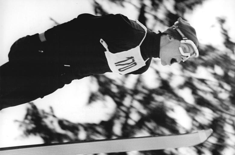 Zentralbild Thieme 23.2.709 Johanngeorgenstadt: III. Kinder- und Jugendspartakiade Der hoffnungsvolle Nachwuchsspringer der Jugend A Henry Glaß - Dynamo Klingenthal - sicherte sich im Spezialsprunglauf am 22.2.70 eine Goldmedaille.